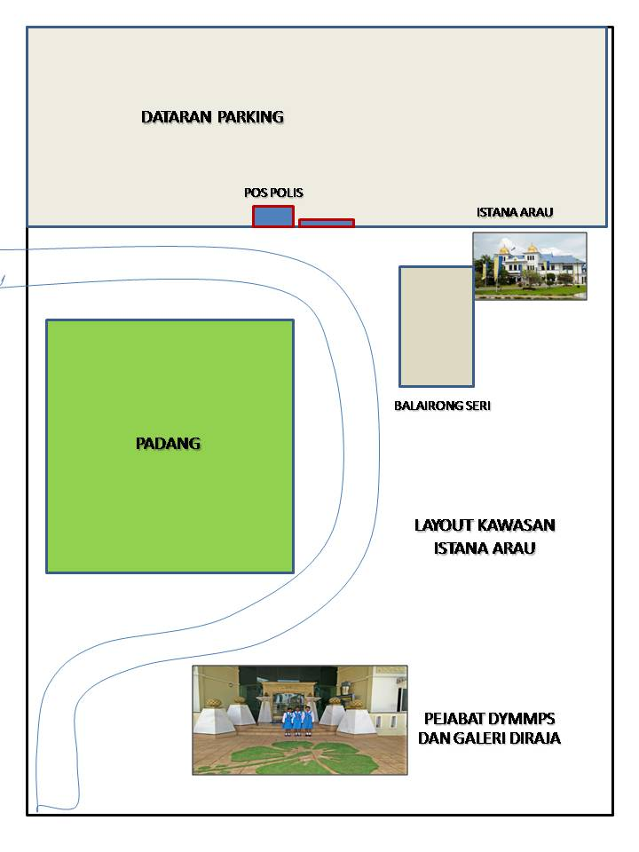 KELUASAN KAWASAN ISTANA ARAU PERLIS